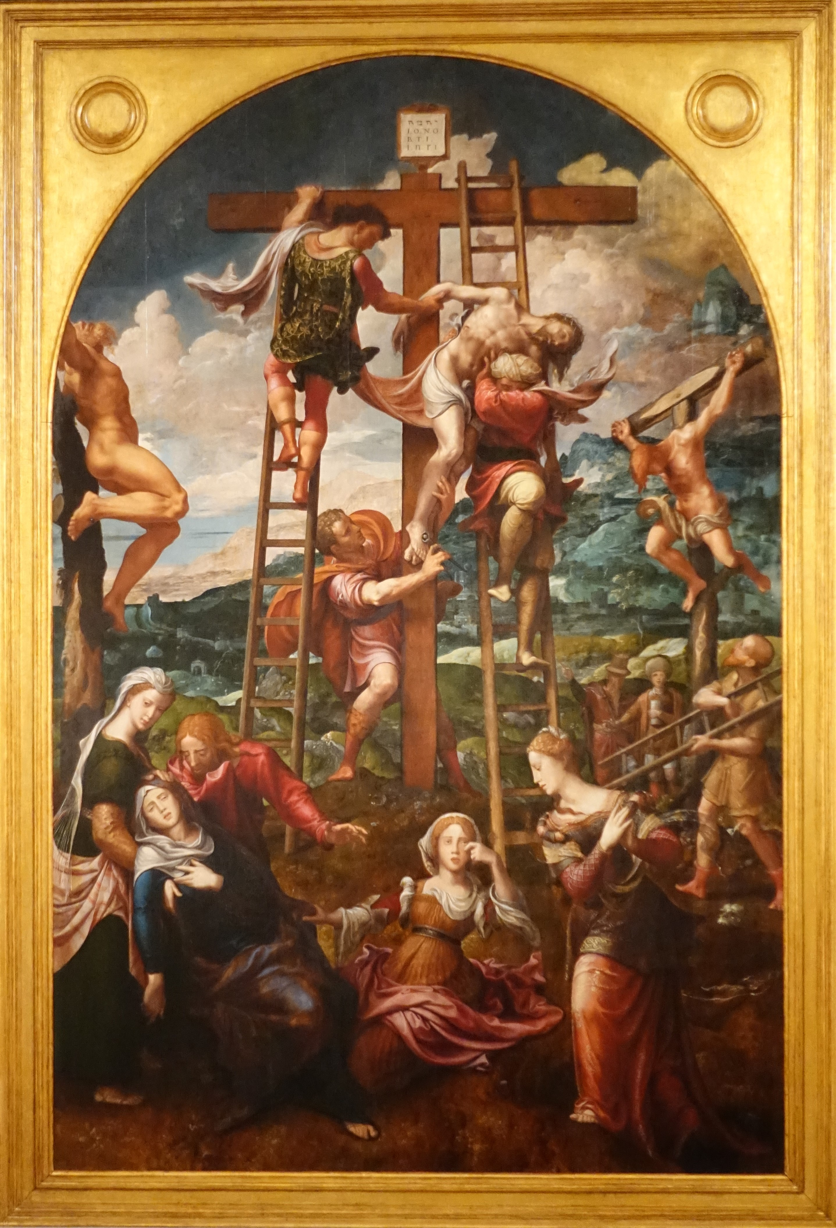 Descida da Cruz, painel central do Tríptico da Descida da Cruz (1540-5) de Pieter Coeck van Alest no Museu Nacional de Arte Antiga, Lisboa, Portugal.